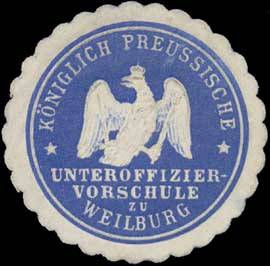 Sealing stamp Title: K.Pr. Unteroffiziervorschule zu Weilburg Description: Place: Weilburg size: 4 cm